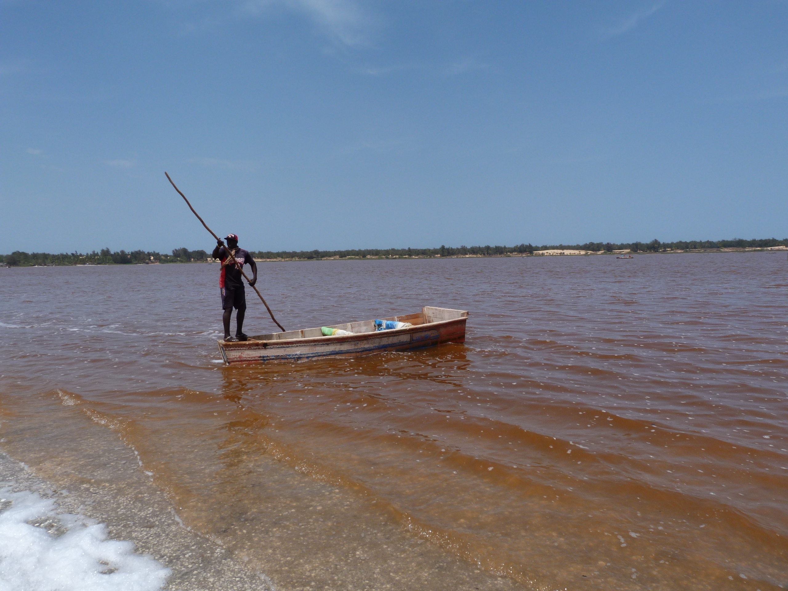 Récolteur de sel dans sa barque sur le lac rose au Sénégal